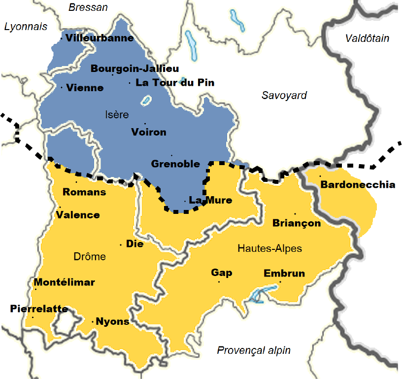 Carte linguistique du Dauphiné : Bleu : Dauphinois arpitan. Jaune : Dauphinois occitan, dialecte vivaro-alpin. Ligne noire pointillée: Frontière entre arpitan et occitan. Nom en italique : Dialectes arpitans et occitans extérieurs au Dauphiné. Nom droit : Départements français du Dauphiné.